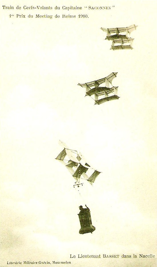 Cerf-volant du lieutenant Rasset lors de la Grande Semaine d'Aviation de la Champagne (1910) .